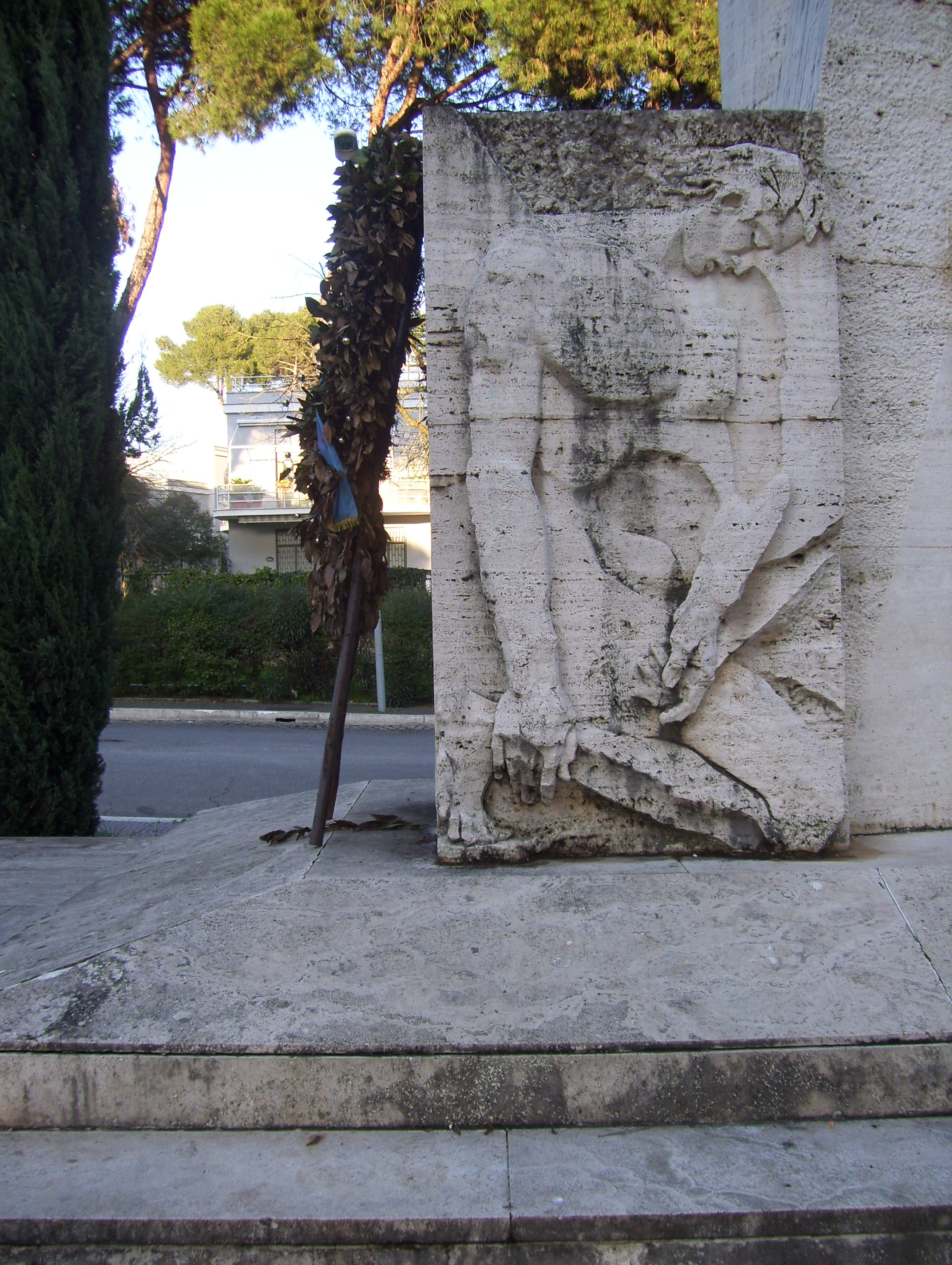 Monumento ai caduti per l'unità d'Italia (dettaglio), Via Leonardo da Vinci, Guidonia